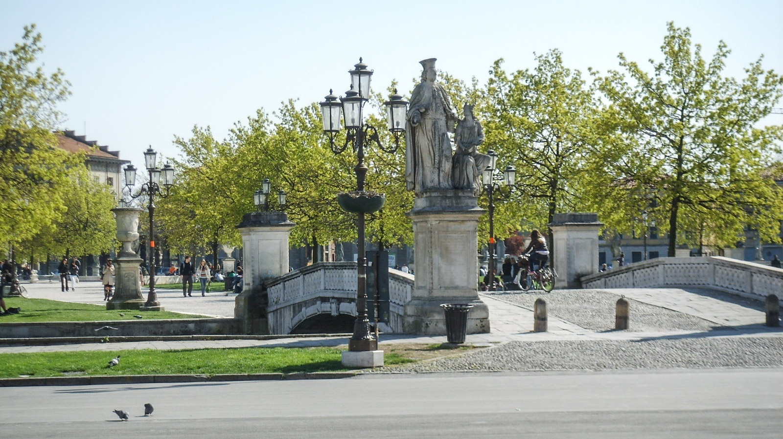 Padova, prato della valle